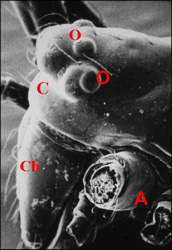 Prosoma d' Argyrodes femelle vu au microscope électronique à balayage